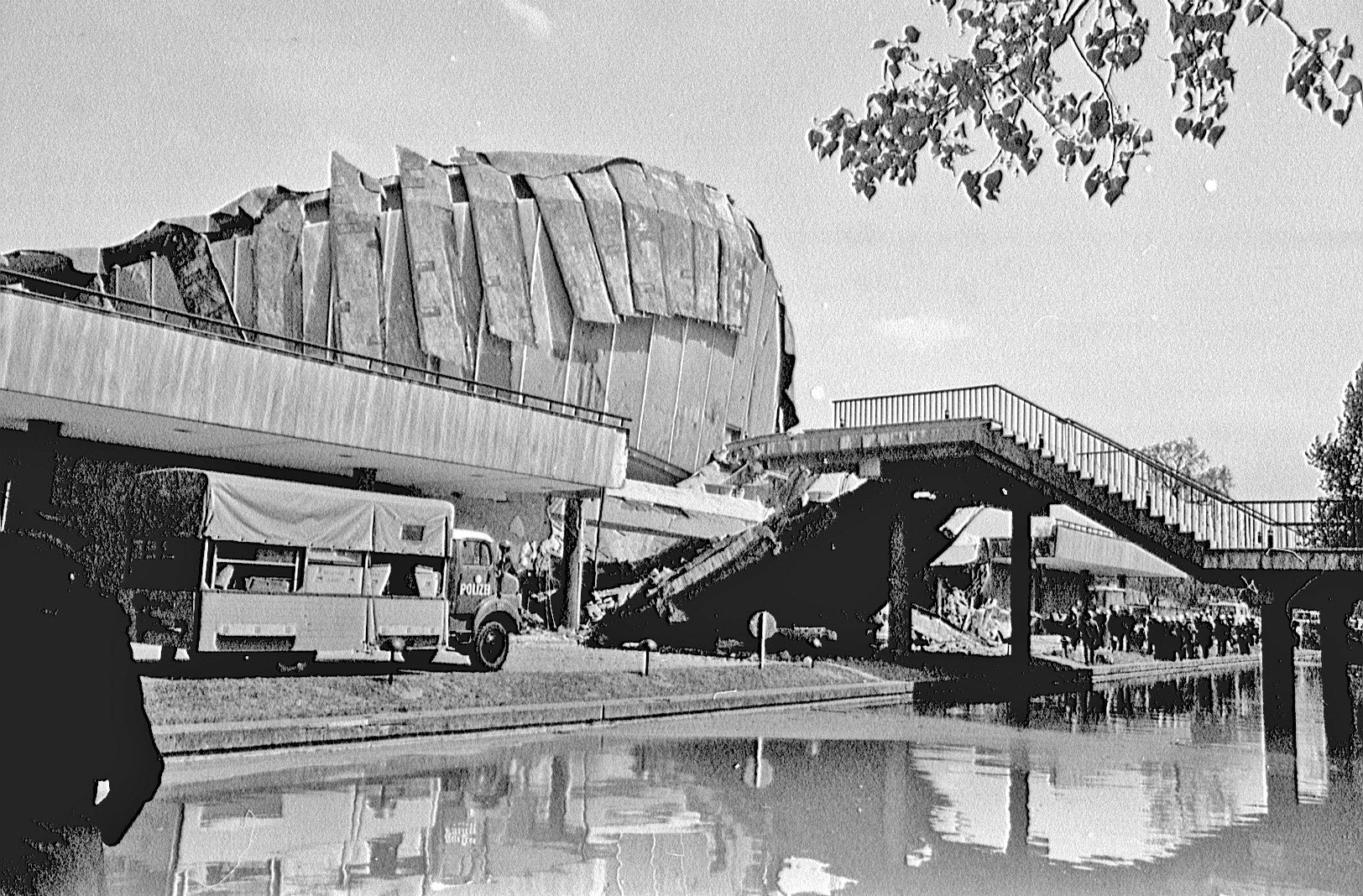 Kongresshalle Berlin, teilweise eingestürzt